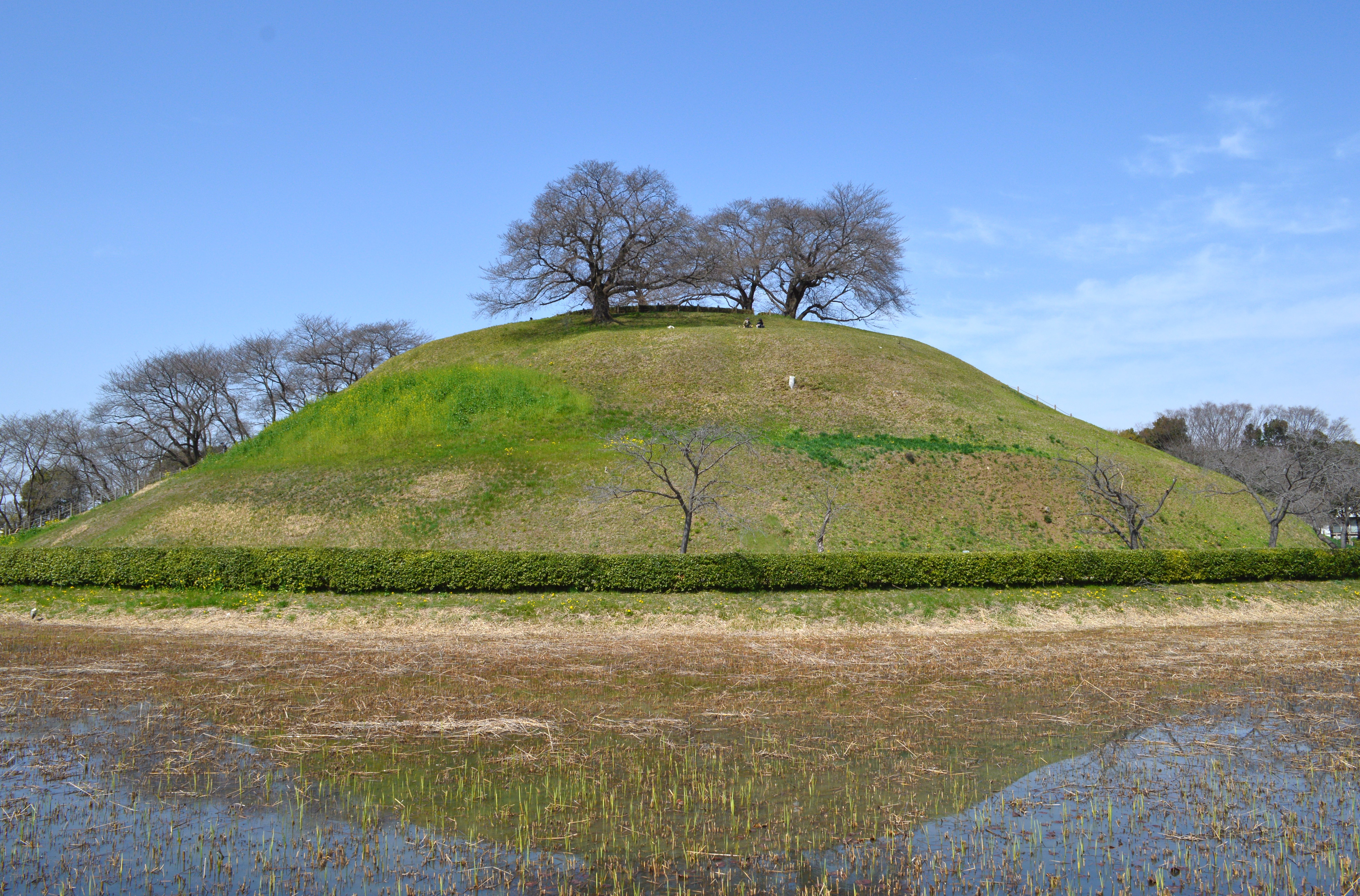 丸墓山古墳 (行田市) 墳丘全景